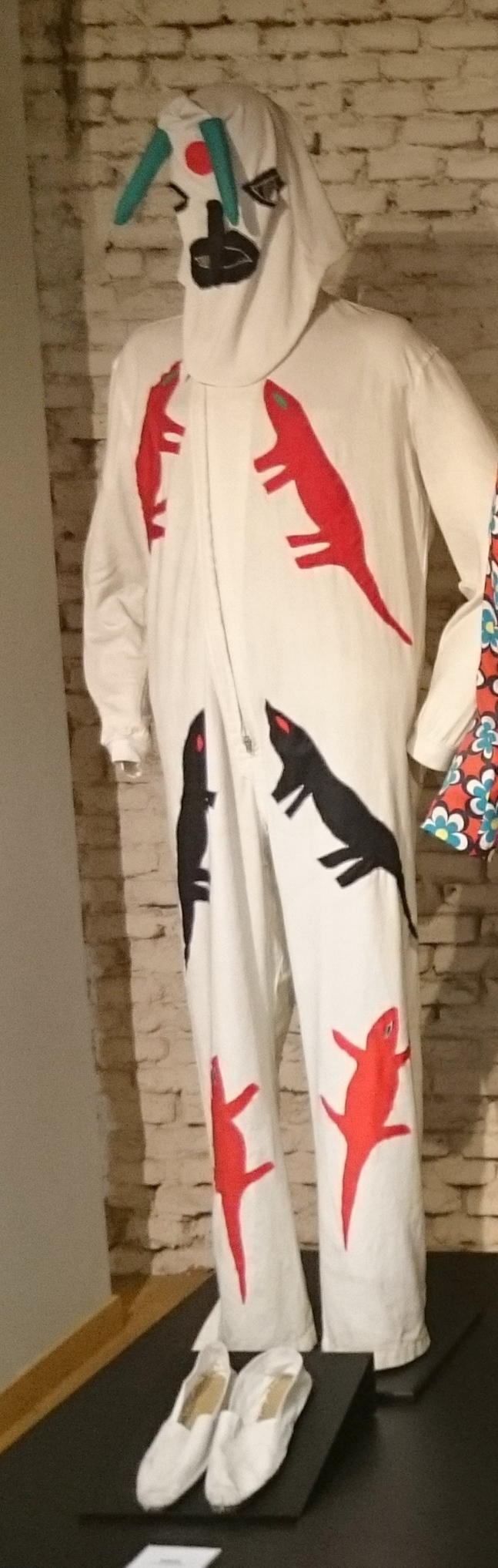 Traje de Dimoni de la Santantonà (Forcall, Castellón)